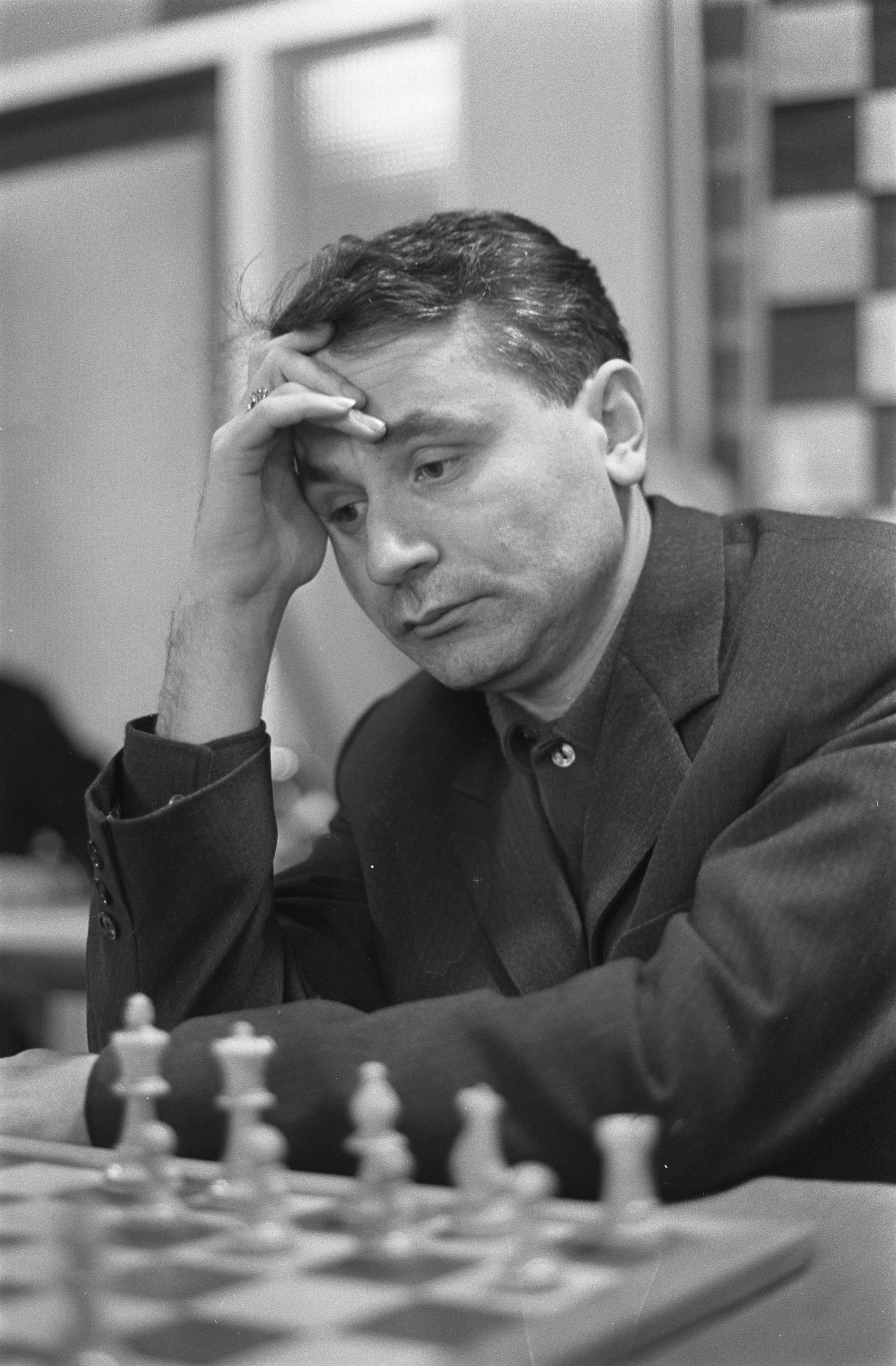 Collectie / Archief : Fotocollectie Anefo Reportage / Serie : [ onbekend ] Beschrijving : Hoogovenschaaktoernooi, D. Ciric (Yugo-Slavie) Datum : 12 januari 1968 Locatie : Joegoslavië Trefwoorden : schaken Persoonsnaam : D. Ciric Instellingsnaam : Hoogovenschaaktoernooi Fotograaf : Kroon, Ron / Anefo Auteursrechthebbende : Nationaal Archief Materiaalsoort : Negatief (zwart/wit) Nummer archiefinventaris : bekijk toegang 2.24.01.05 Bestanddeelnummer : 920-9848